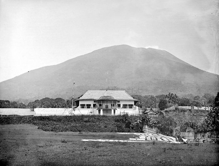 Negatief. Kraton van de Sultan van Ternate